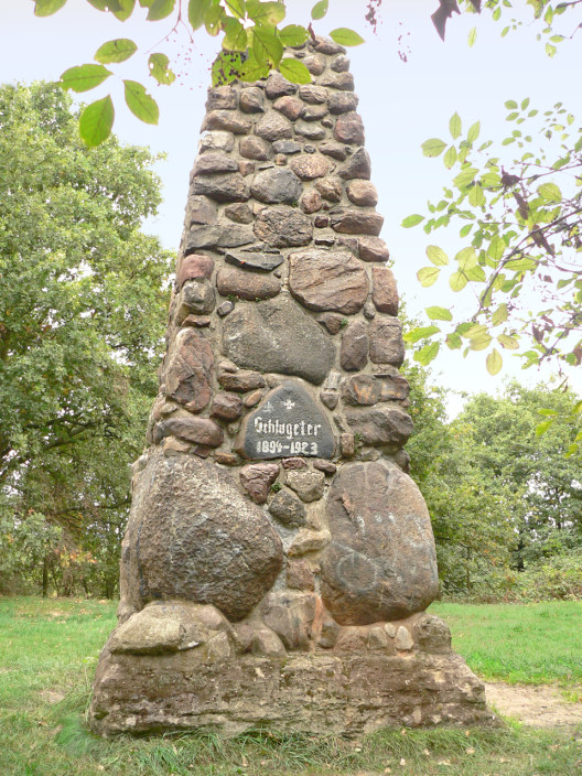 Schlageter Stein aus Findlingen von 1925 bei Peine